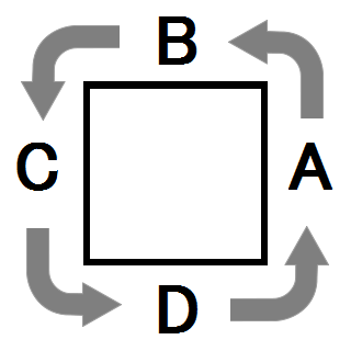 麻雀におけるツモ番/ツモ順の進行方向。および親番の移動の進行方向